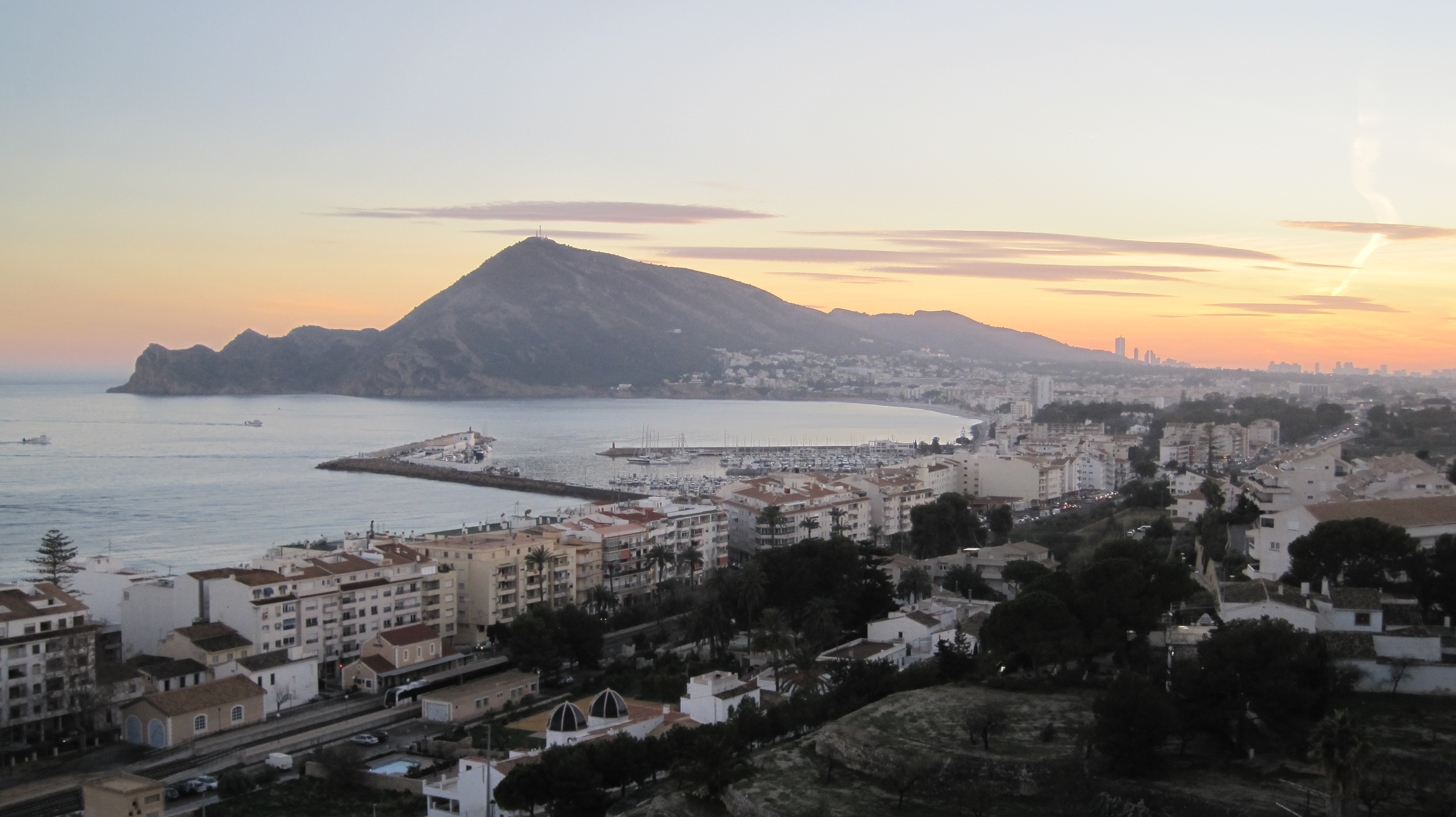 Vista de El Albir y el puerto de Altea, en Alicante (España).